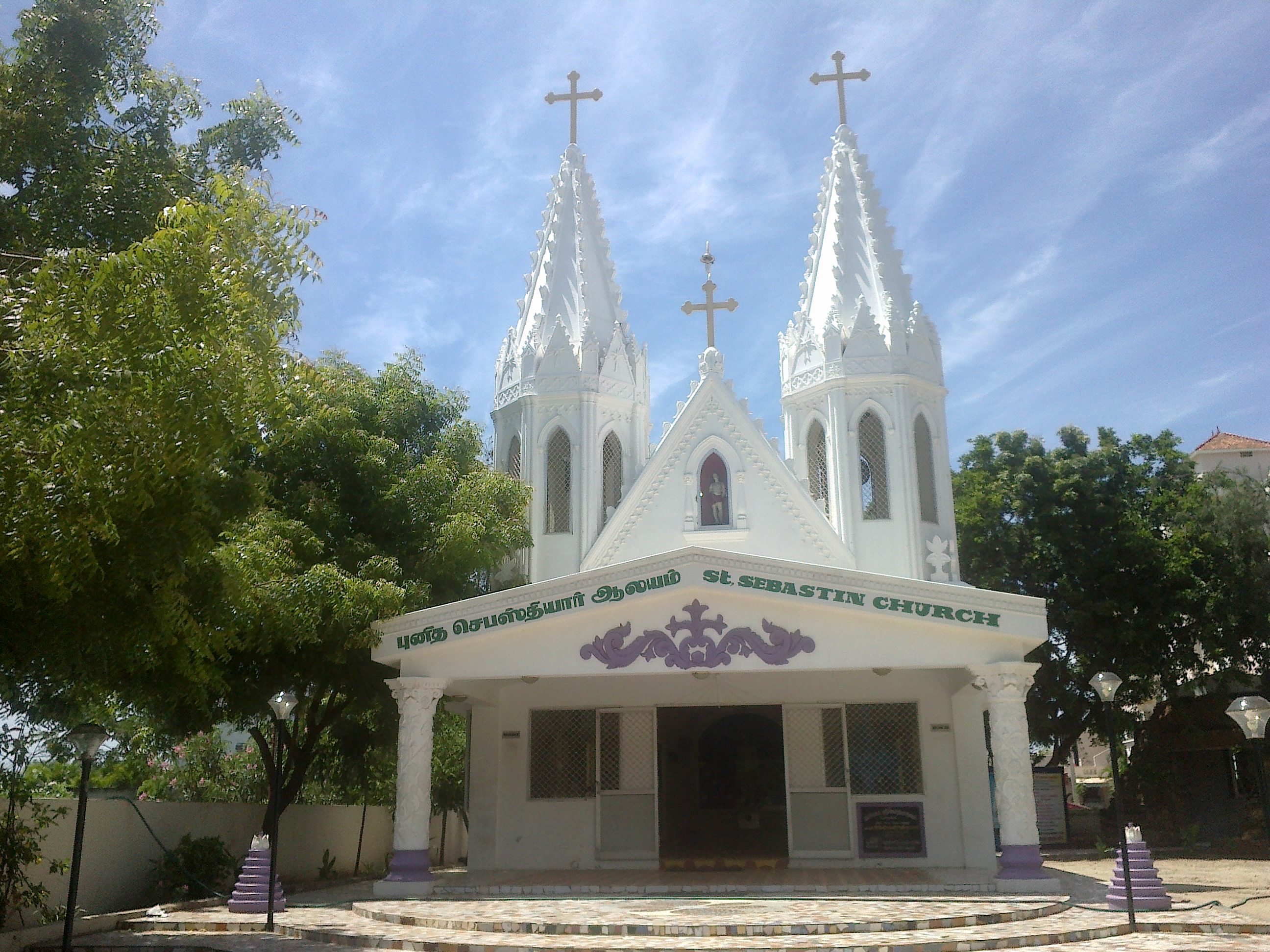 St Sebastian Church at Vailankanni, TN